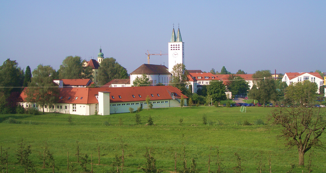 Meckenbeuren, Germany: Stiftung Liebenau, view from the East